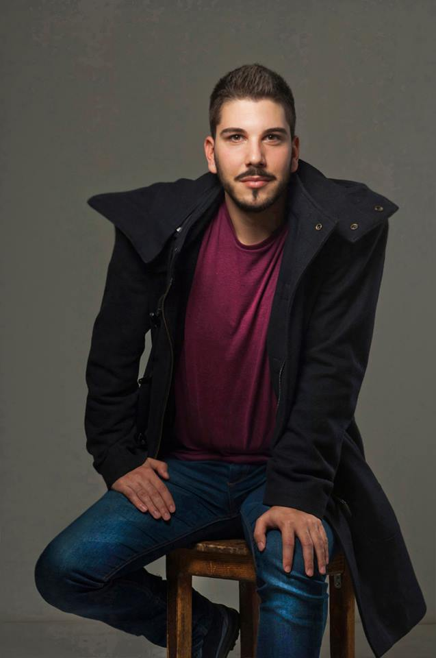 Књижевник, драмски и аудиовизуелни уметник